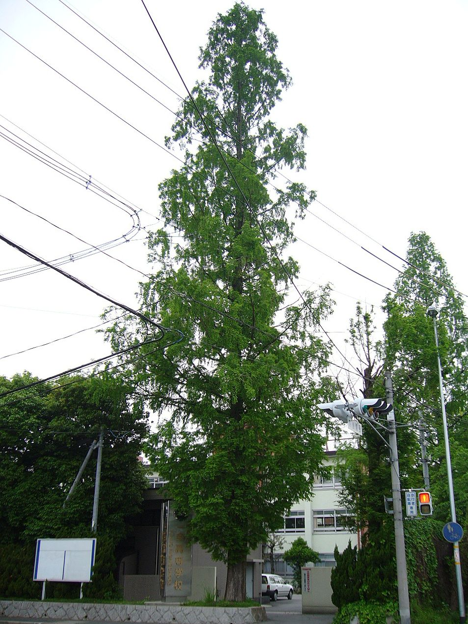 奈良市立一条高等学校 法華寺町東交差点から北望